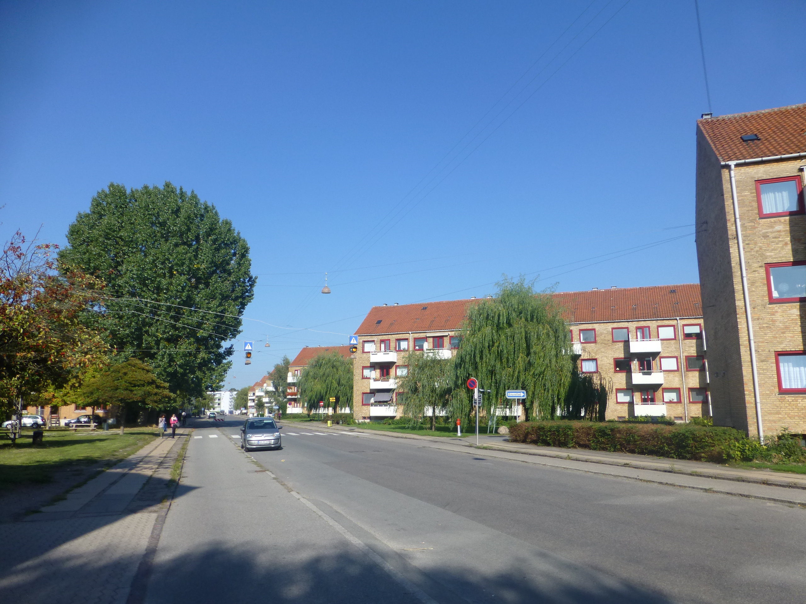 The street Ryparken in Østerbro in Copenhagen.